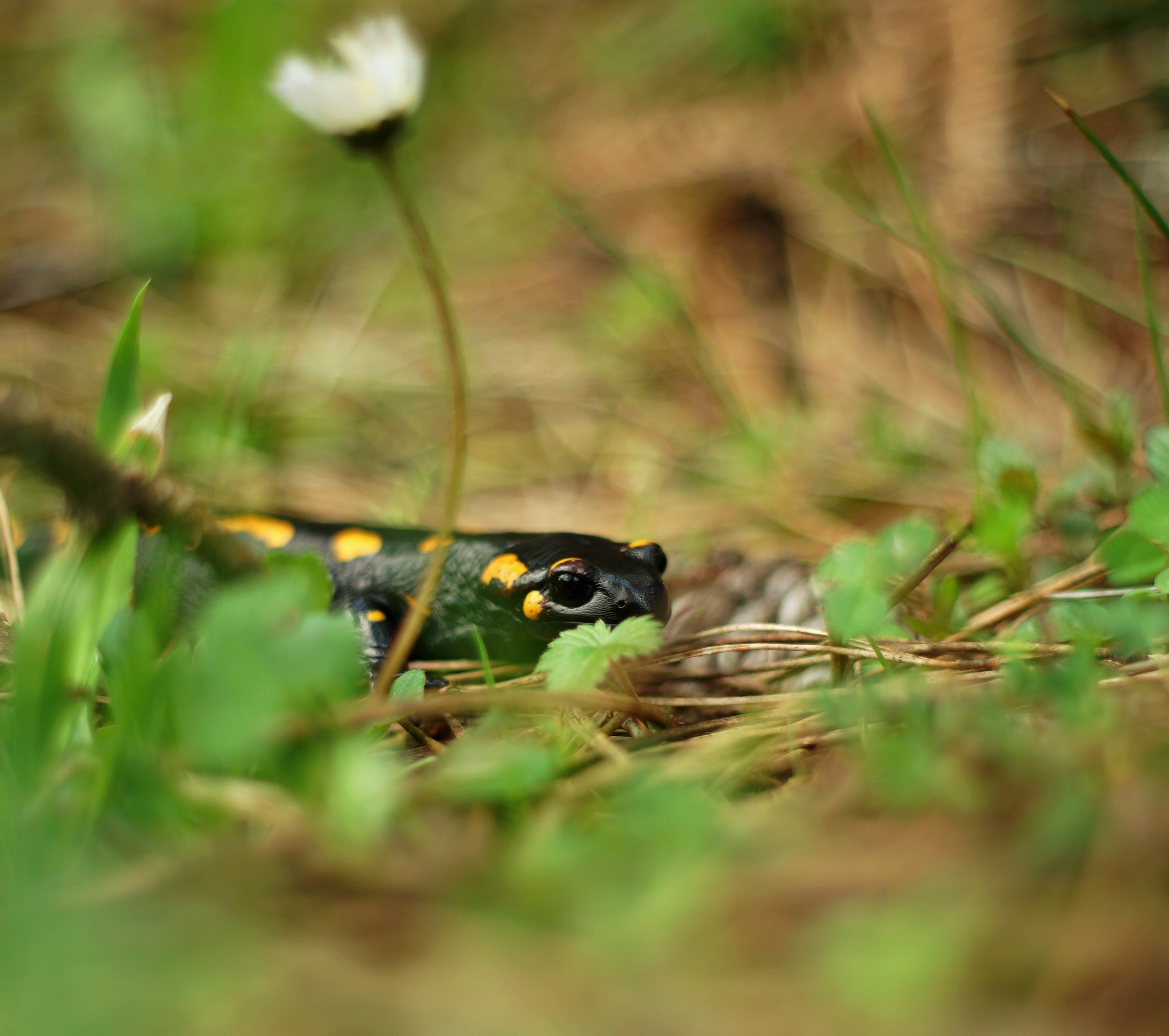 Σαλαμάνδρα ( Salamandra salamandra ) στον Ε.Δ Πίνδου Βάλλια Κάλντα This is a photography of Natura 2000 protected area with ID GR1310002